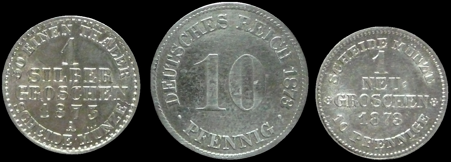 1 Silbergroschen 1873 zu 2,196 g mit 0,483 g Feinsilber und 10 Pfennig 1873 zu 4,0 g Kupfer-Nickel-Legierung und 1 Neugroschen 1873 zu 2,100 g mit 0,483 g Feinsilber Nach Einführung der Reichswährung bleiben gemäß Artikel 15 Nr. 3 Münzgesetz vom 09. Juli 1873 die Nominale - 2½ Silbergroschen zum Wert von 25 Pfennig - 2 Silbergroschen zum Wert von 20 Pfennig - 1 Silbergroschen zum Wert von 10 Pfennig - ½ Silbergroschen zum Wert von 5 Pfennig Zahlungsmittel an Stelle der Reichsmünzen bis zur Außerkurssetzung ab 01. Juni 1876 zum gleichen Wert. Der Umtausch musste bis 31. August 1876 an den Kassen der Bundesstaaten erfolgen, die diese Münzen geprägt haben oder in deren Gebiet dieselben Zahlungsmittel sind.